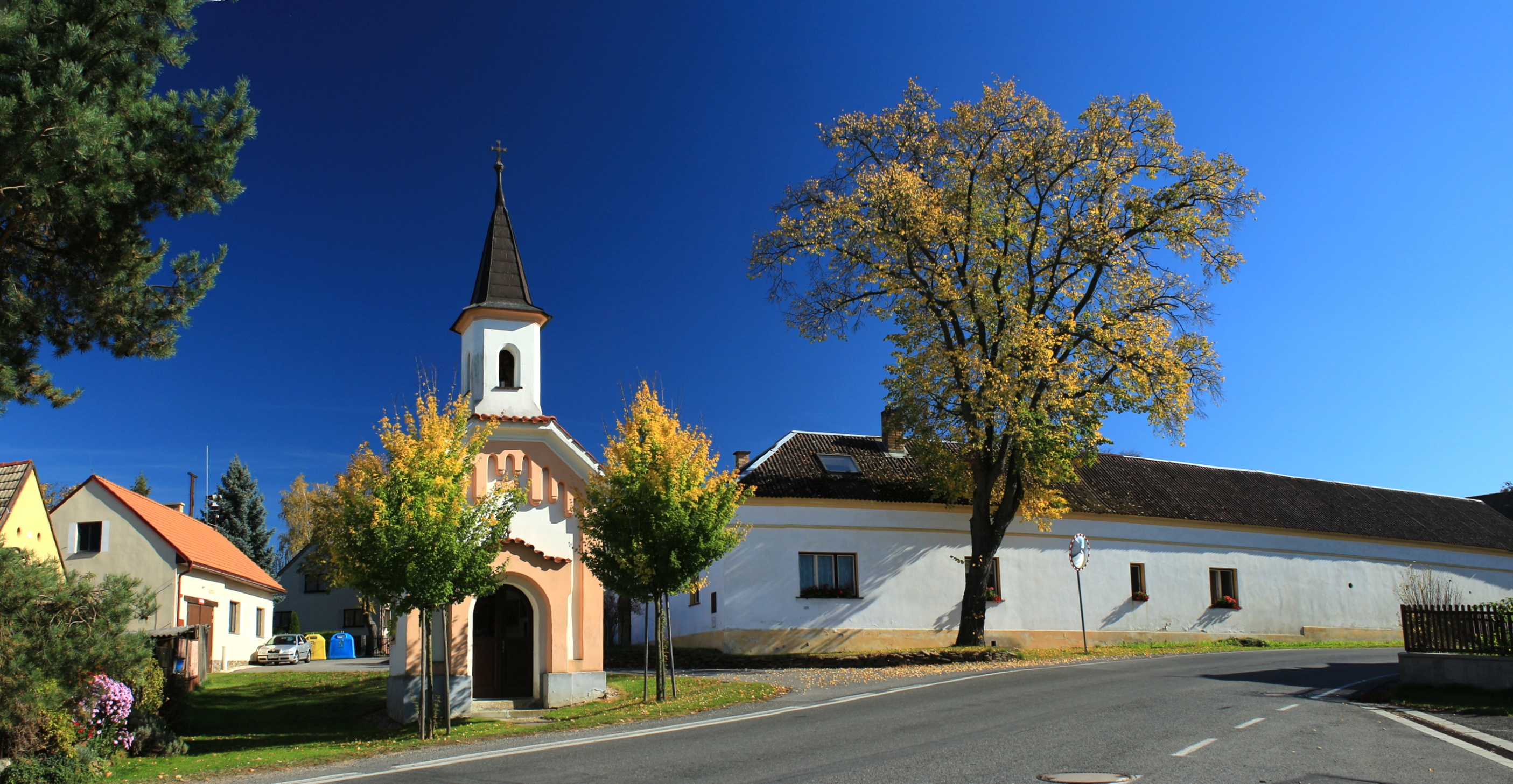 Bechyňská Smoleč a kaplička sv. Jana Nepomuckého